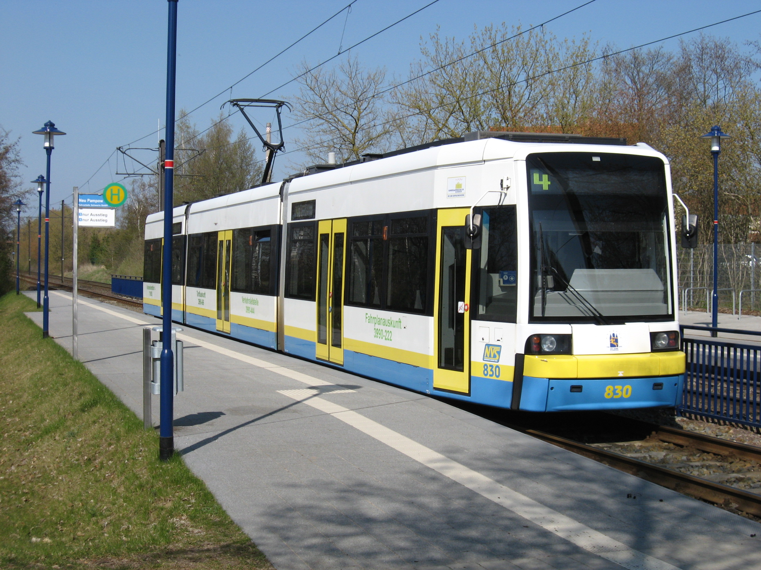 Trams in Schwerin